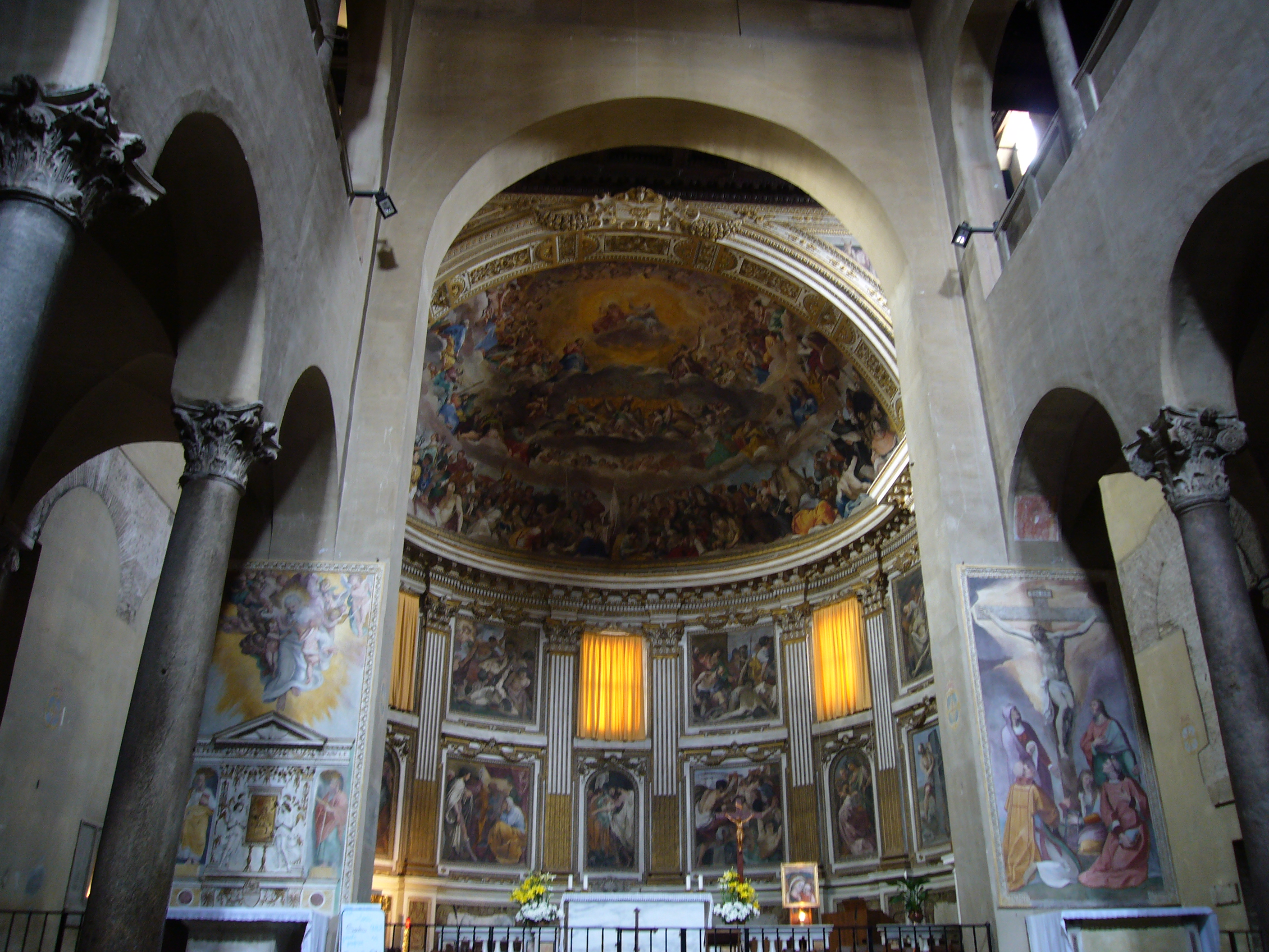 Roma, Santi Quattro Coronati: interno